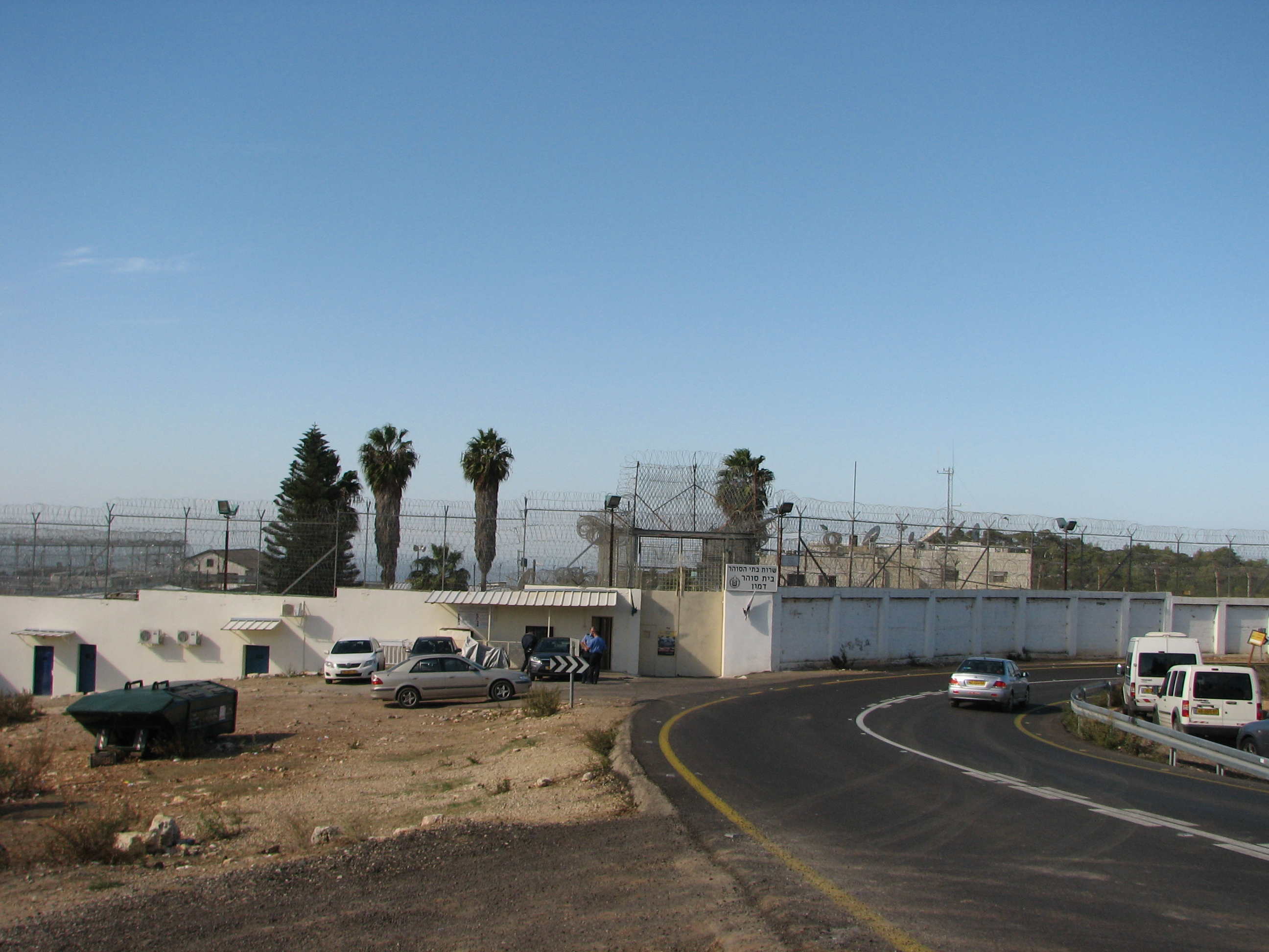 Damon Prison, located on Mount Caramel. Israel בית סוהר דמון הוא בית כלא השוכן על הר הכרמל. בית הסוהר הוקם בשנת 1953